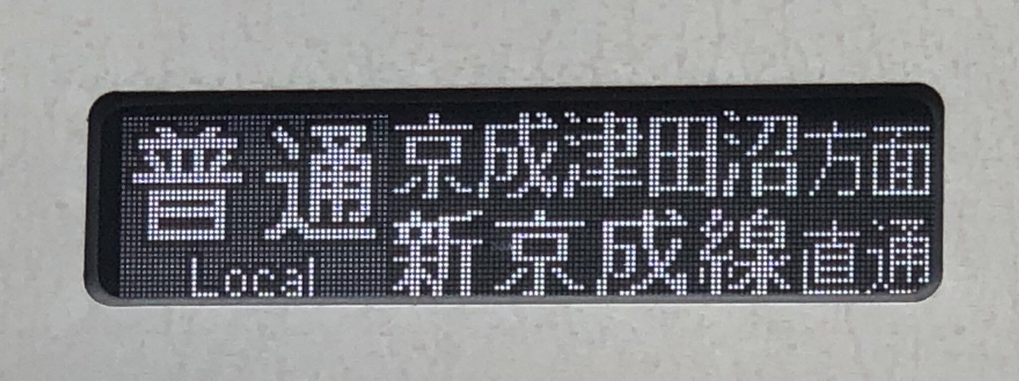 新京成電鉄N800形N858編成のフルカラーLED表示器 普通京成津田沼方面新京成線直通